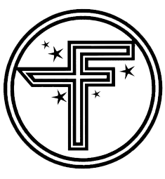 logo federación de comercio star wars